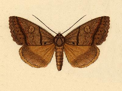 Ptichodes herbarum